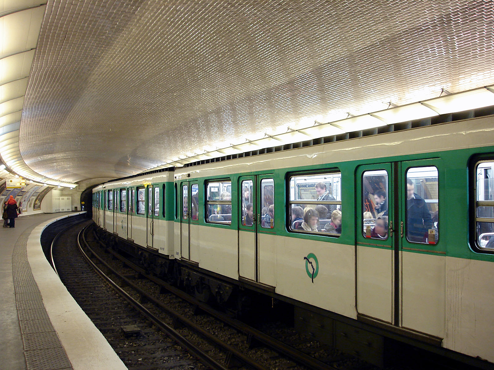 Station Mabillon, de la ligne 10 du métro de Paris, France.